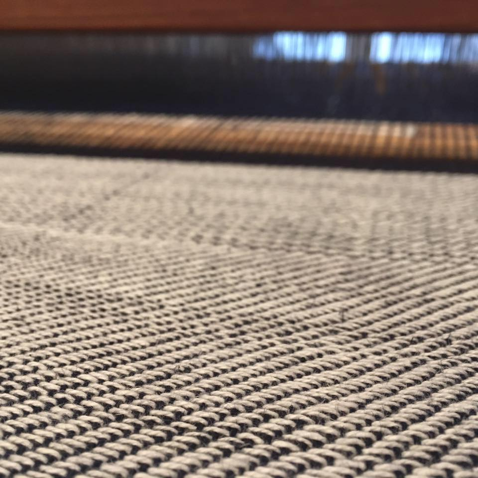 Reconstitution de toile de Nîmes réalisée par les Ateliers De Nîmes